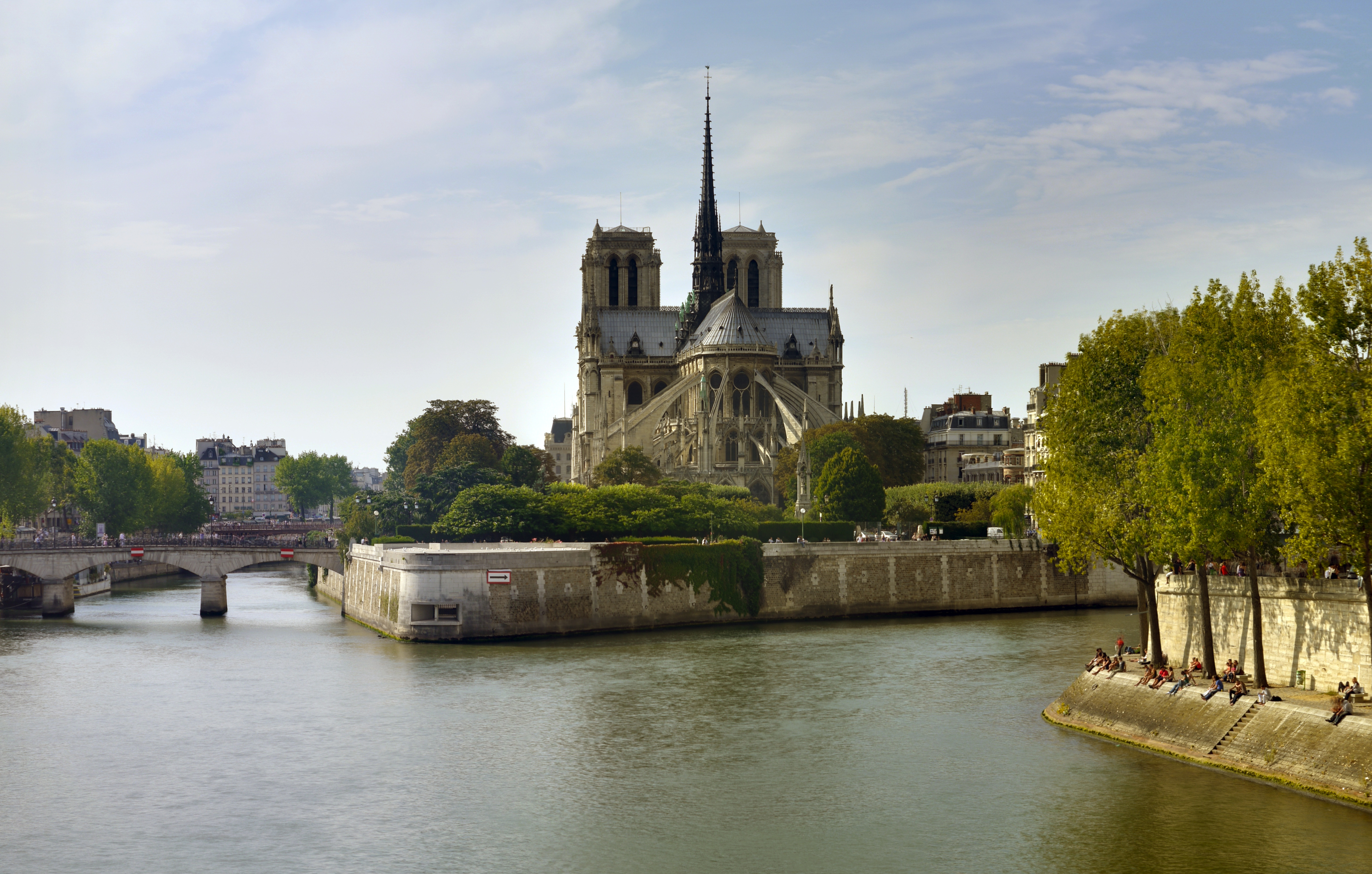 Notre-Dame de Paris.